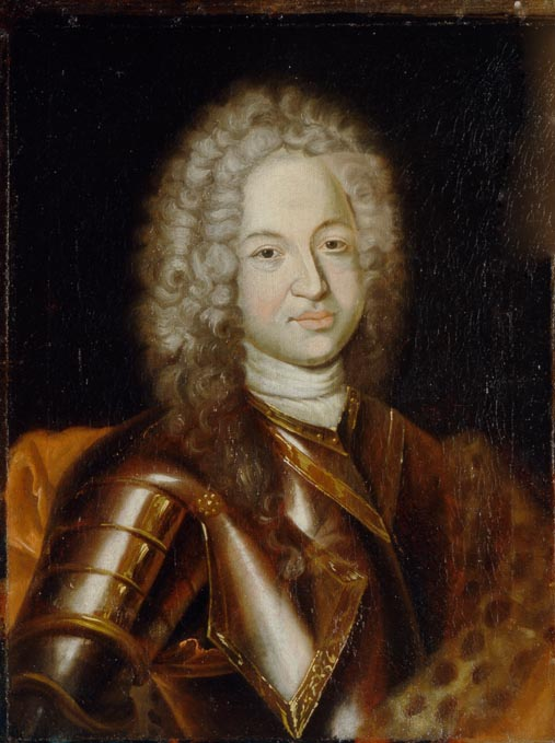 Михаил Гаврилович Головкин (1699/1700 г. — 1754 г., Ярмонг, Якутия) — граф, сын Г. И. Головкина, первый вице-канслер внутренних дел России. Обвинён в измене и сослан в Сибирь. Жена графа Головкина Екатерина Ивановна последовала за супругом добровольно.